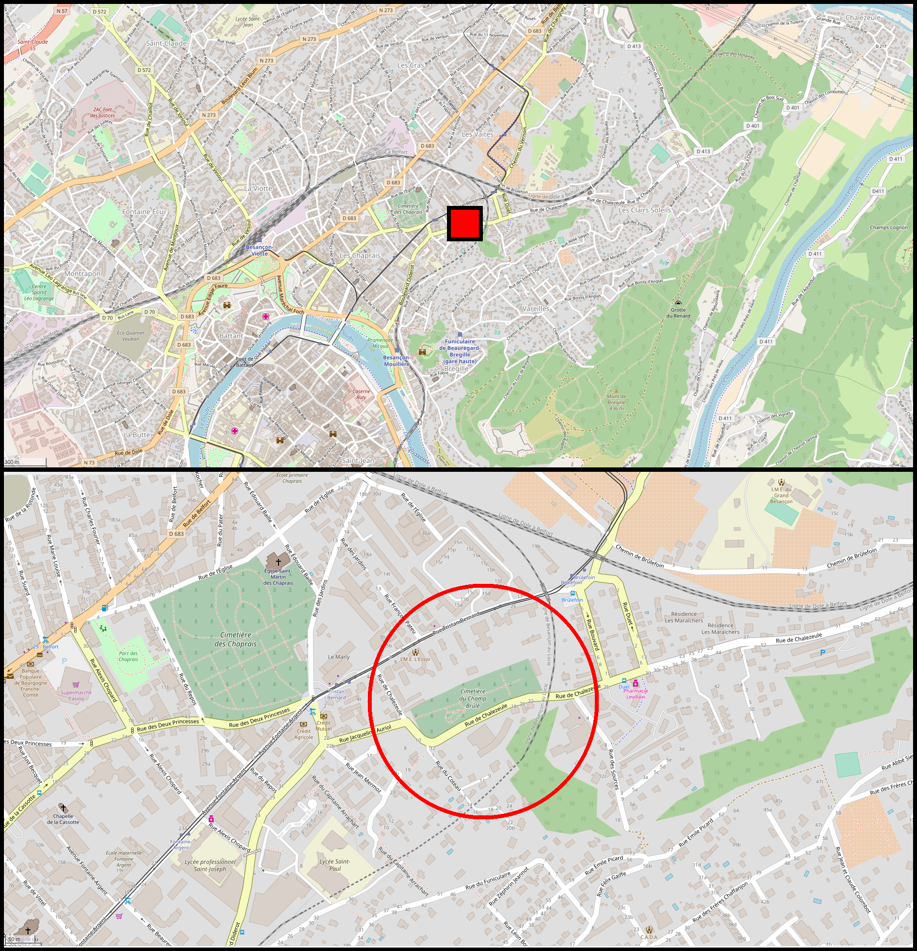 Carte du cimetière des Champs Bruley à Besançon réalisée sur Paint à partir de fichiers originaires de OpenStreetMap (